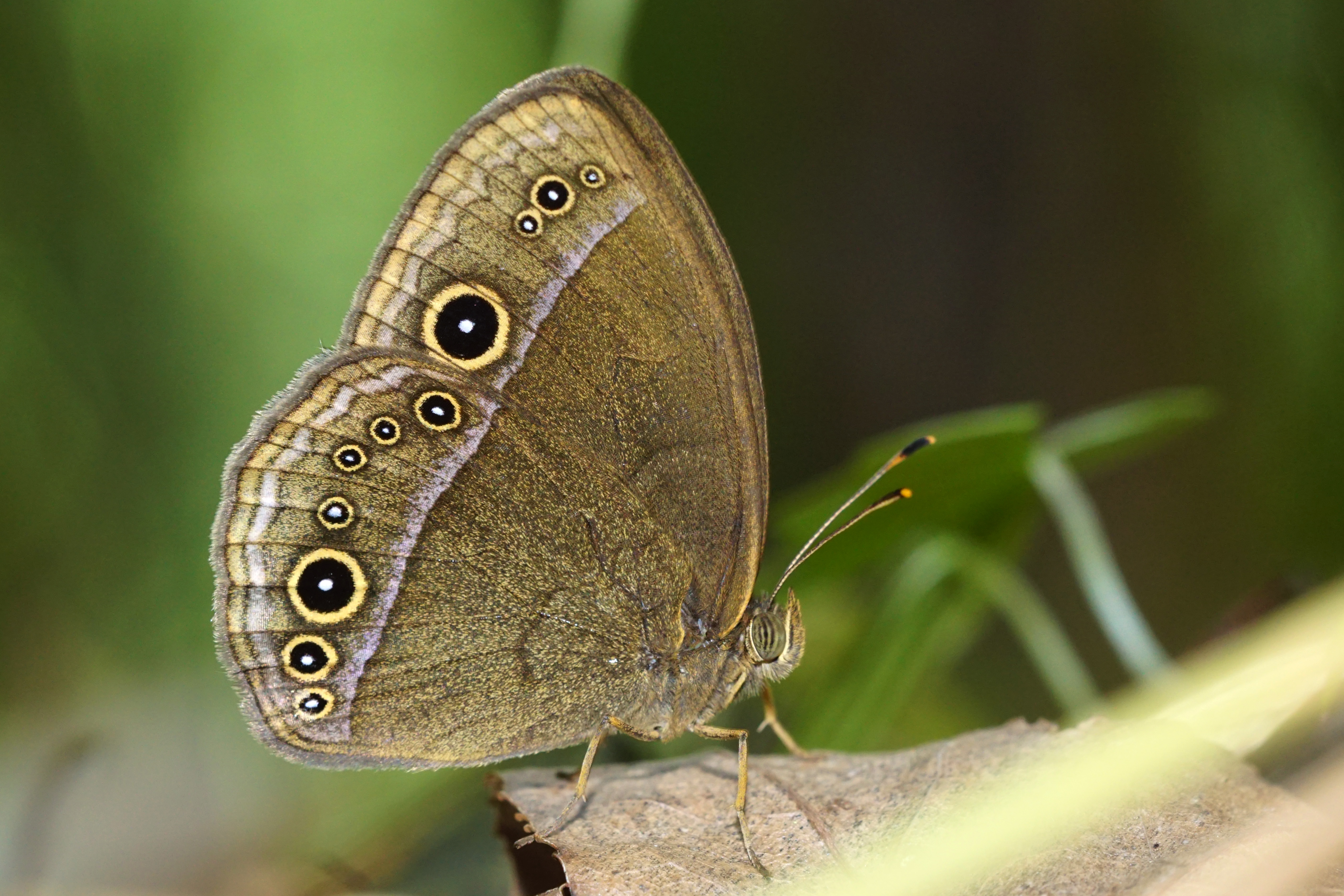 中文（台灣）: 眉眼蝶 Mycalesis francisca formosana